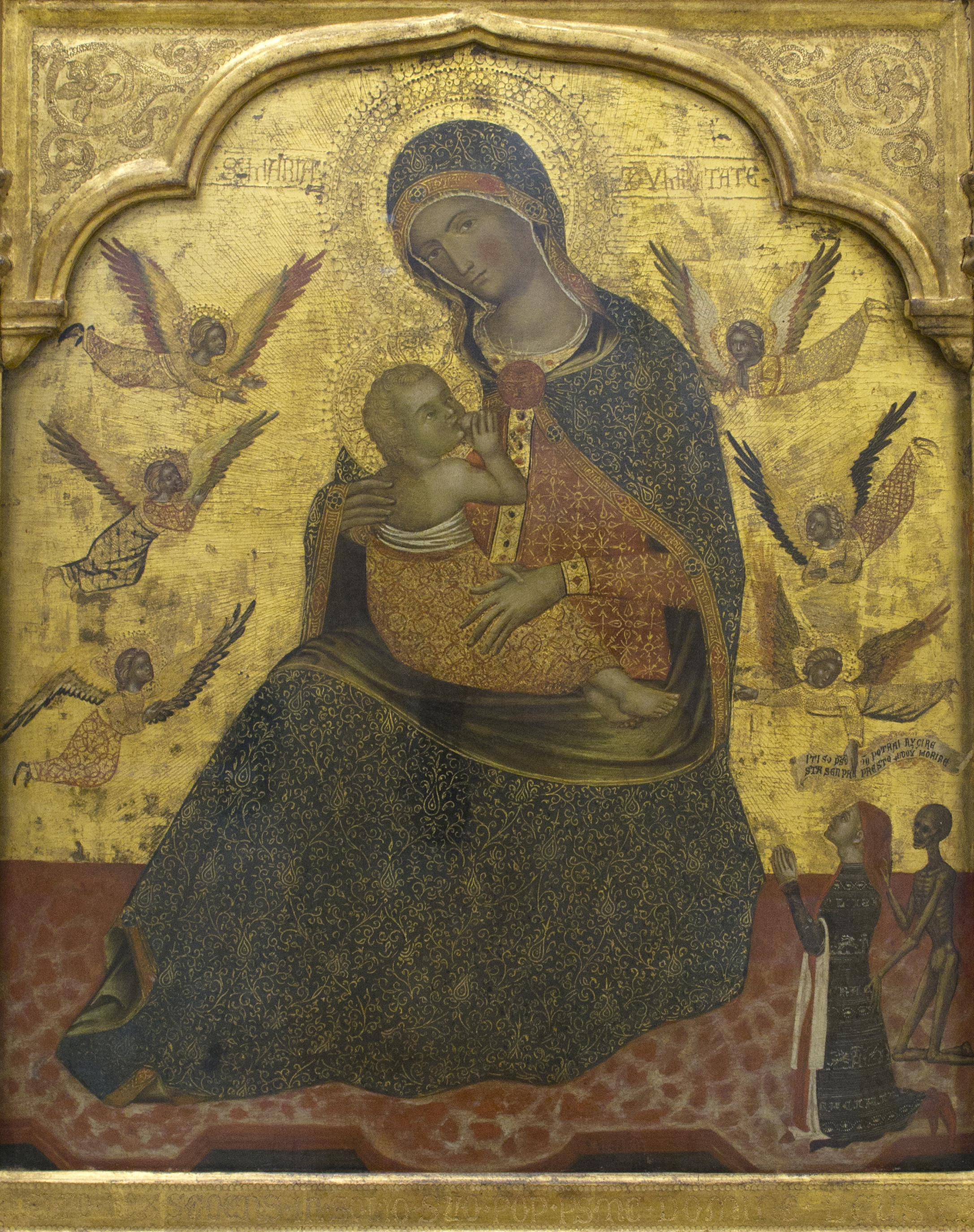 AN. VENECIANO hacia 1360_Virgen de la Humildad con angeles y un Donante_257 (1930.59)